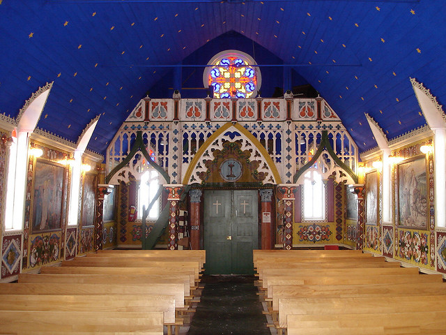 Intérrieur de l'église Notre-Dame-de-Bonne-Espérance à Fort Good Hope